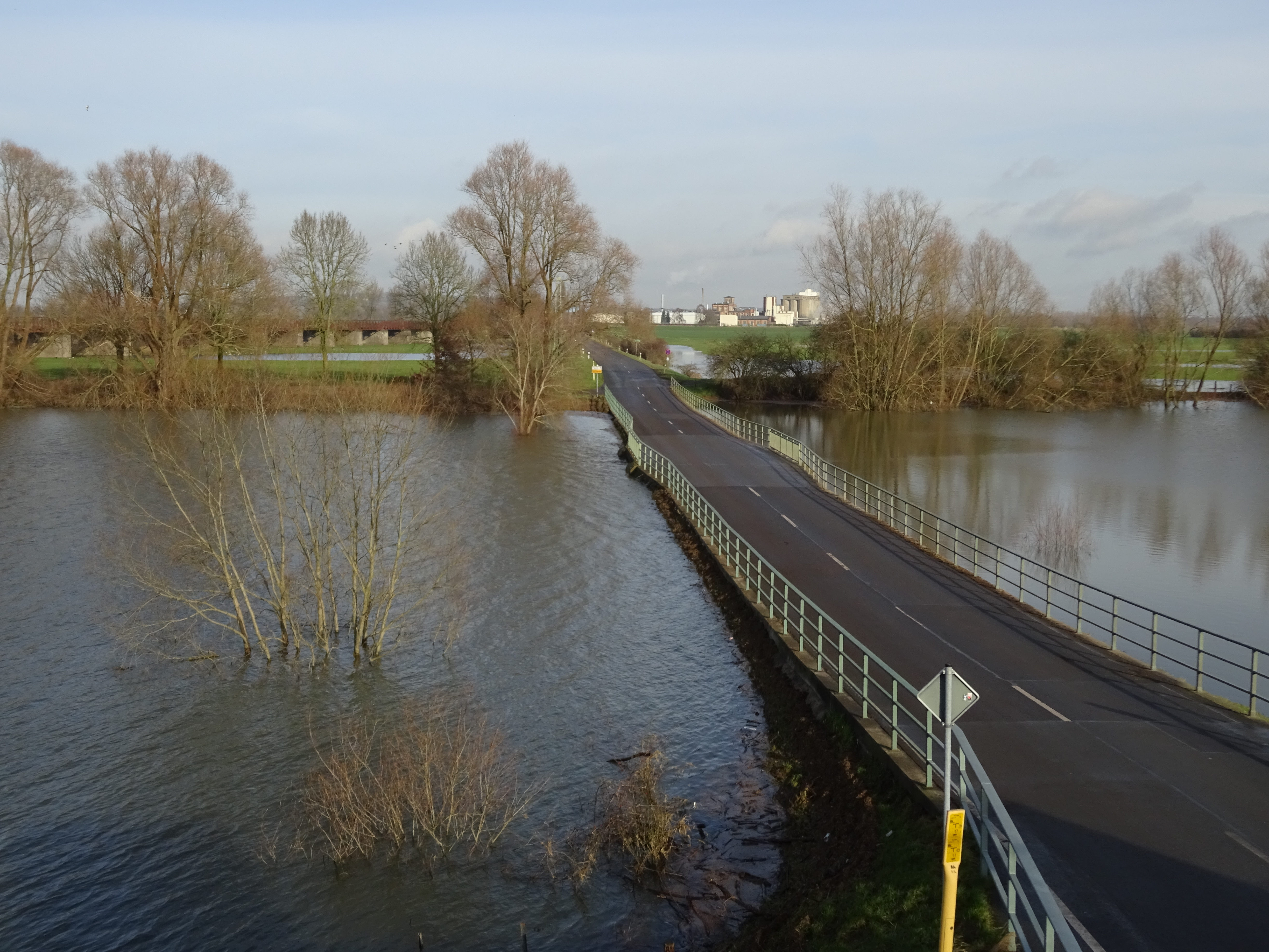 Kleve-Griethausen. Rheinstraße naar Spyck. Links Griethauser Altrhein in het natuurgebied Salmorth, rechts Kellener Altrhein. Aan de horizon Ölwerke Spyck.